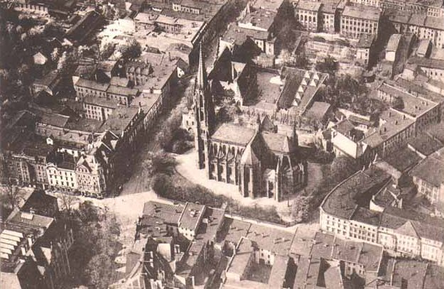 Zdjęcie lotnicze - kościół Św. Trójcy - pocztówka z ok. 1925 r.